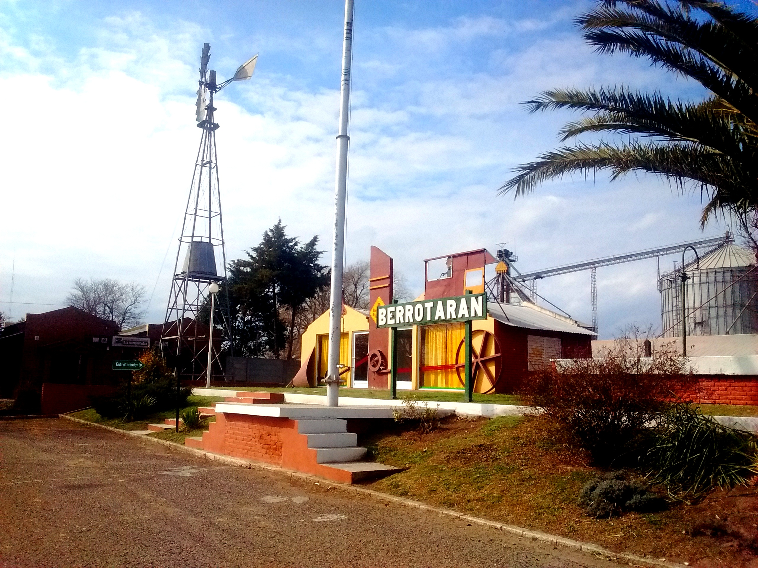 Oficina de turismo en área ferroviaria